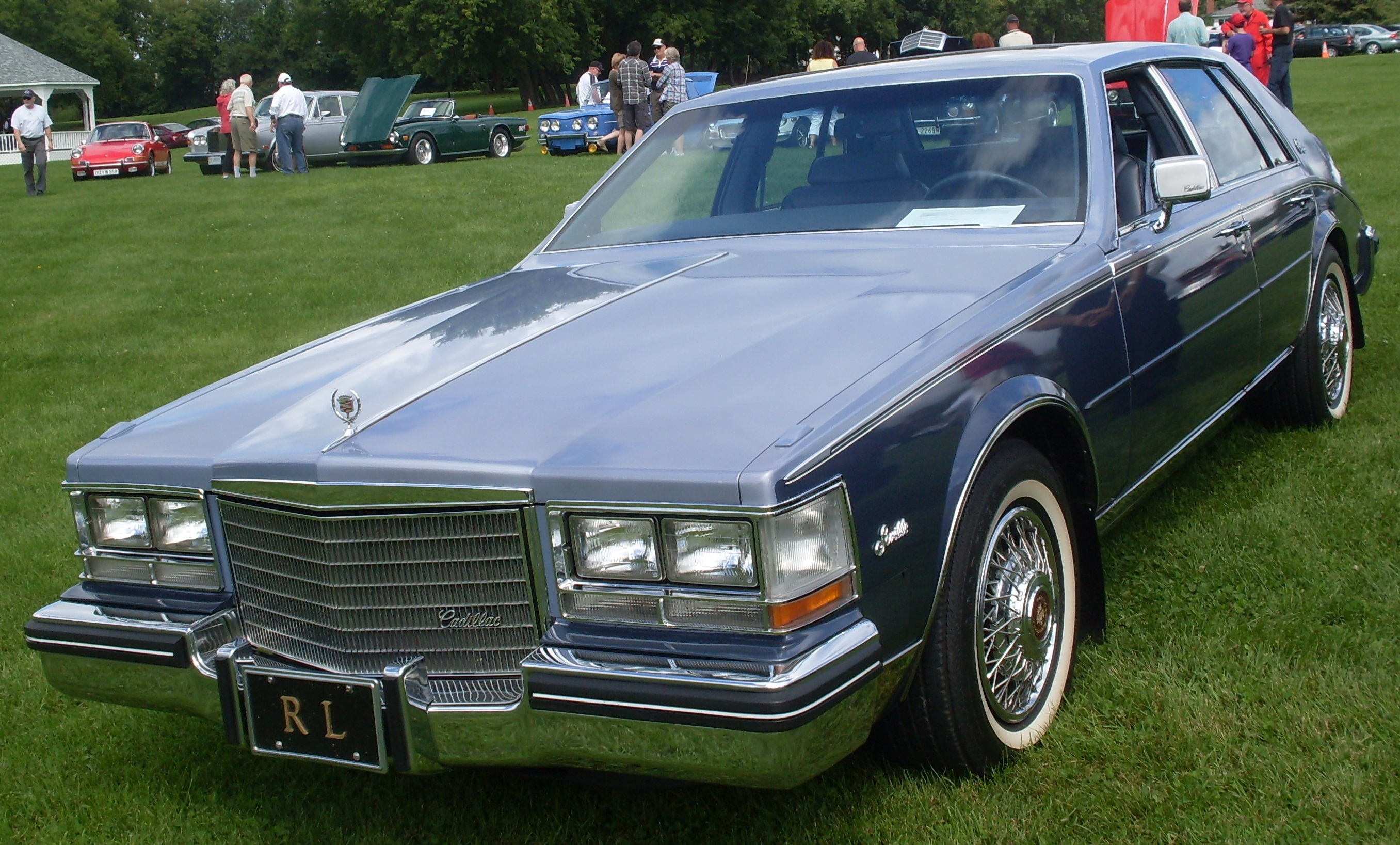 1984 Cadillac Seville & 1973 Triumph TR6 photographed in Baie-D'Urfé, Quebec, Canada at Auto classique VAQ Baie-D'Urfé.